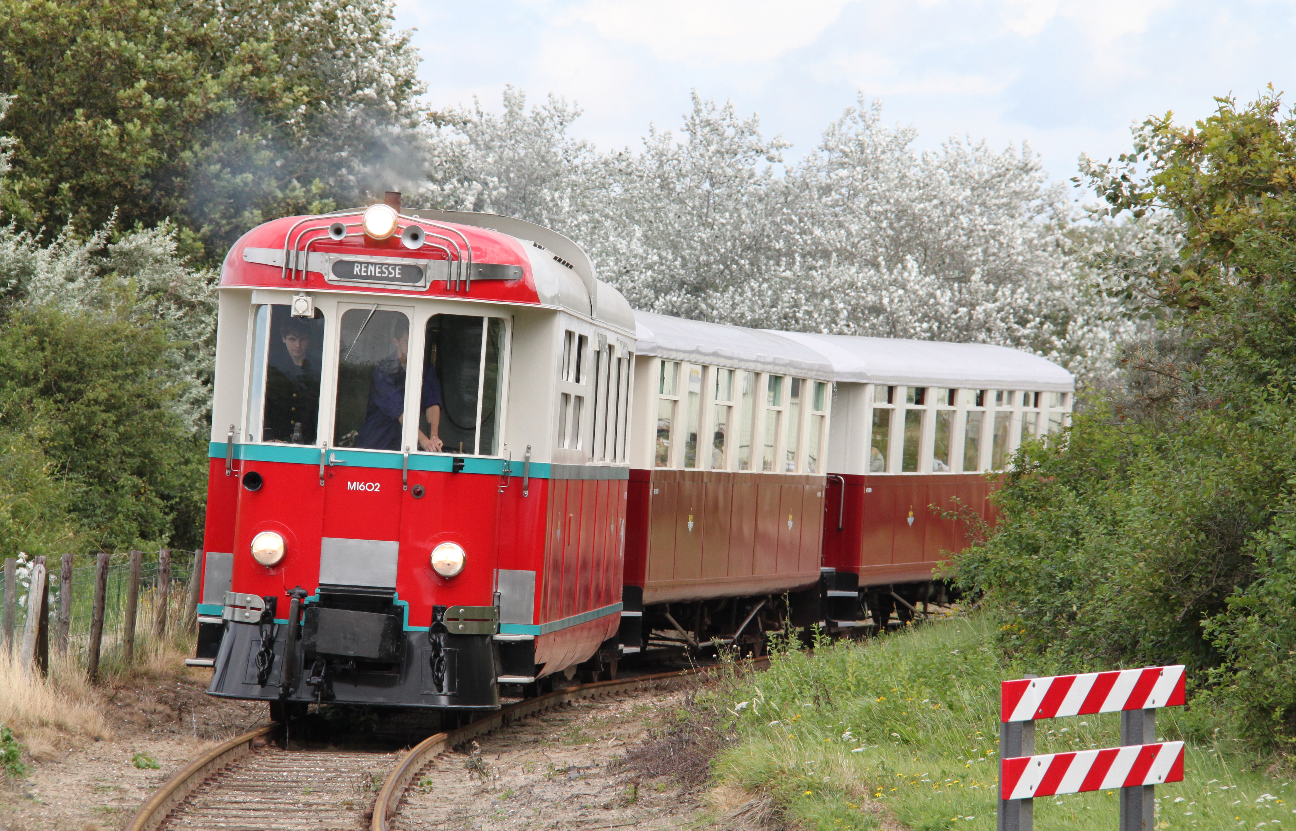 Motorwagen M1602 met een sleep rijtuigen vertrekt vanaf de stalling in Ouddorp richting Port Zélande.